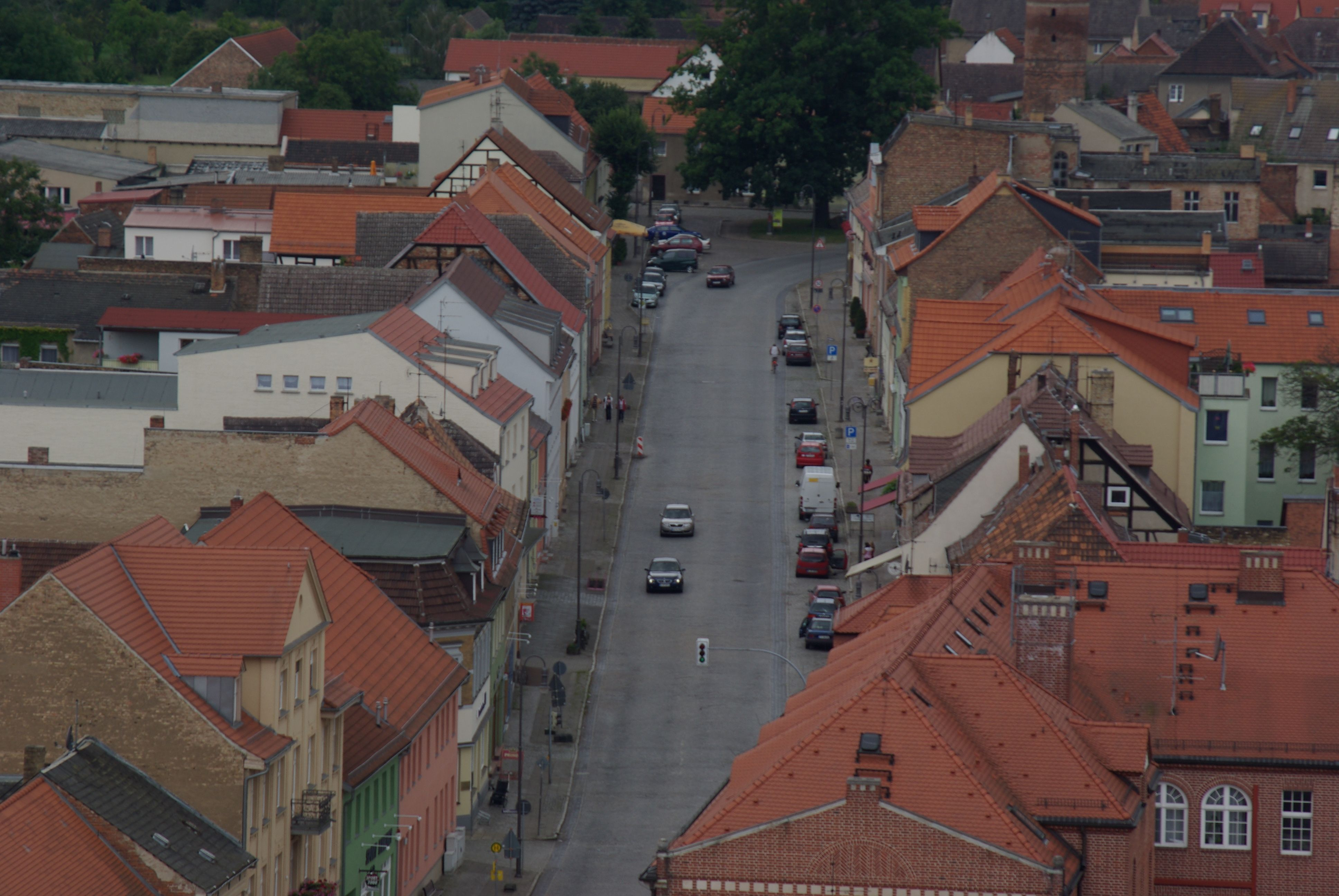 Jüterbog in Brandenburg. Die Pferdestraße in Jüterbog vom Turm der Nikolaikirche aus. Am Ende der Straße stand bis 1875 die Heilig-Geist-Kirche, heute steht da ein Baum.